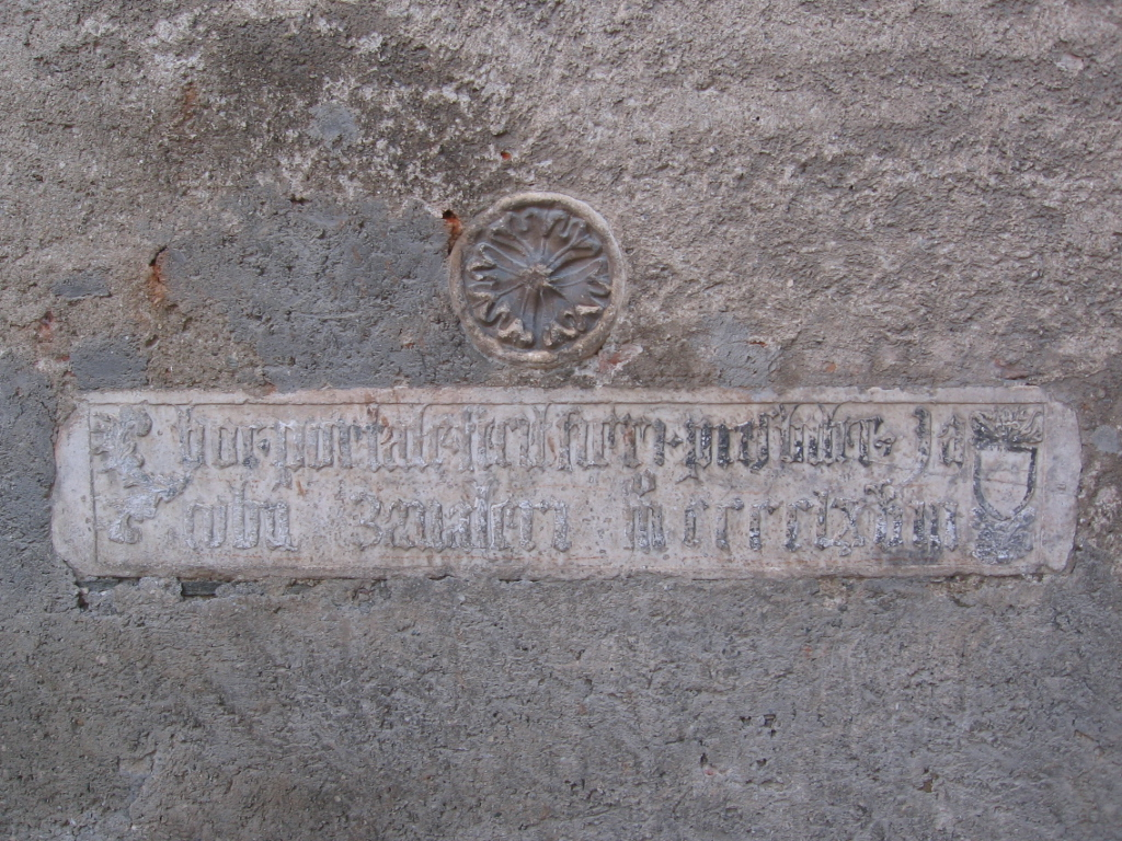 Architrave vecchia chiesa romanico-gotica con rosone di origine sconosciuta e scritta in latino "Hoc portale fecit fieri bresbyter Jacobus Zavateri MCCCCLXVIII" (Il sacerdote Giacomo Zavateri fece costruire questo portale, nel 1468)